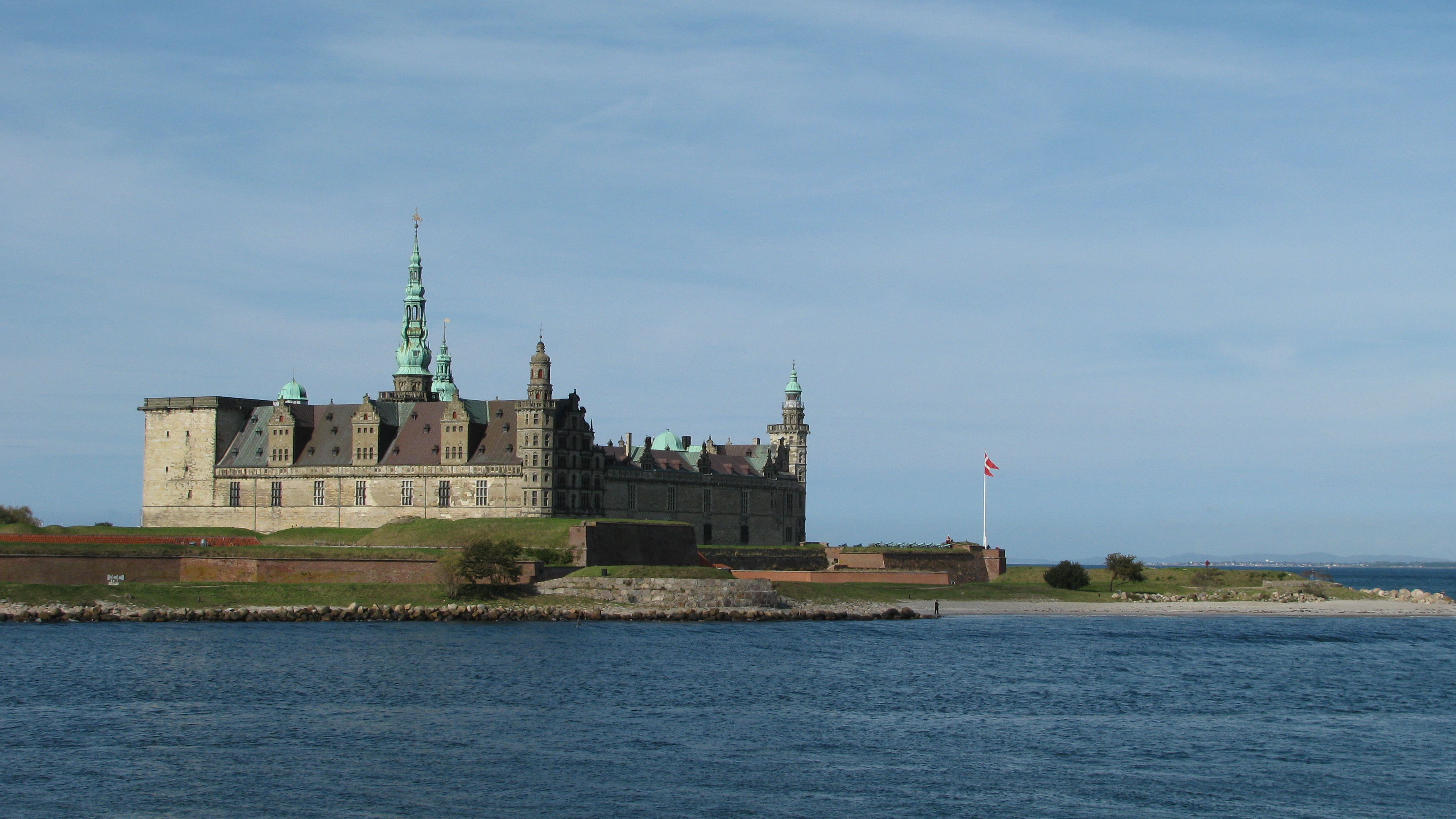 Kronborg Slot in Helsingør